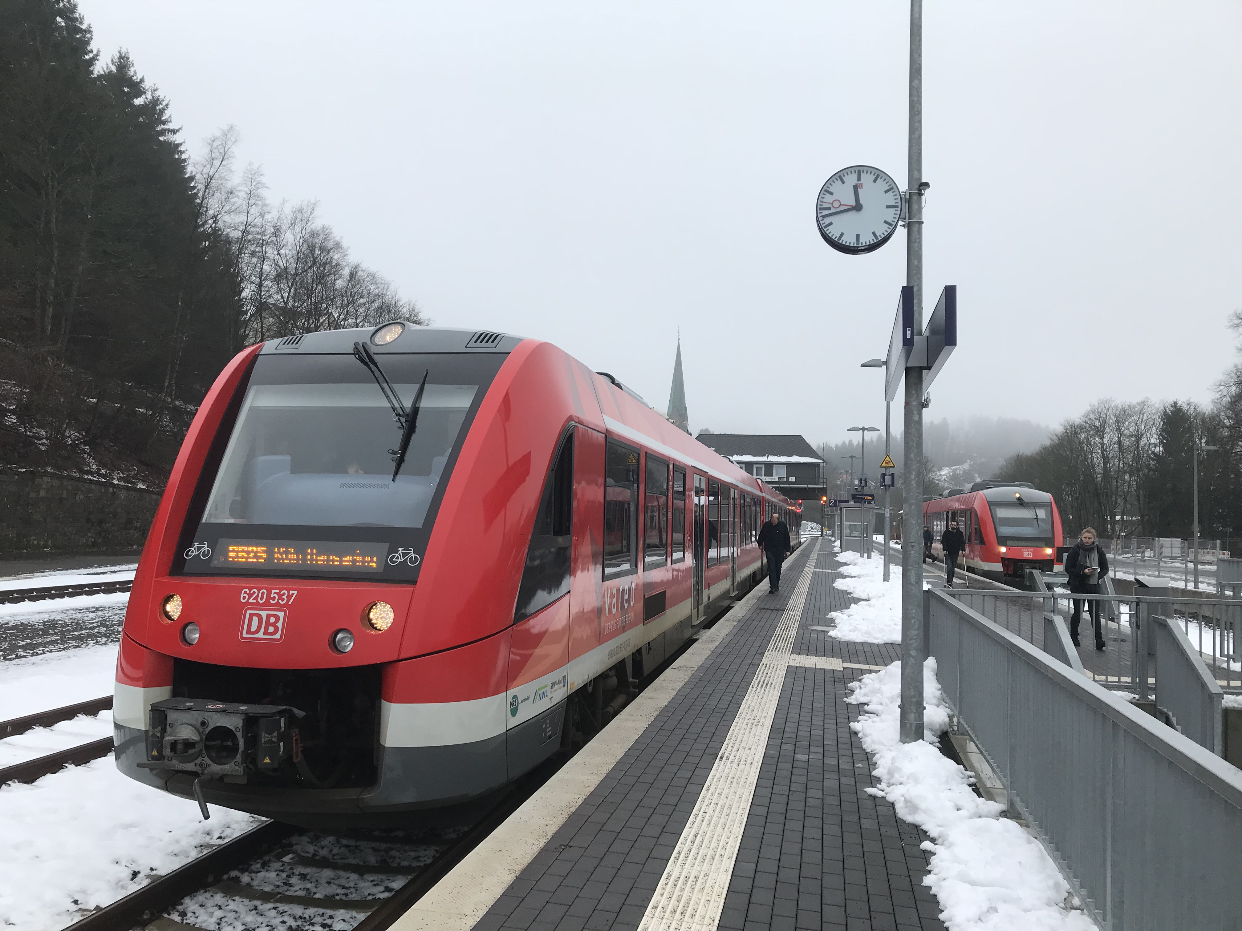 Lint-Triebzug am 19. Dezember 2017 im Bahnhof Brügge (Westf)